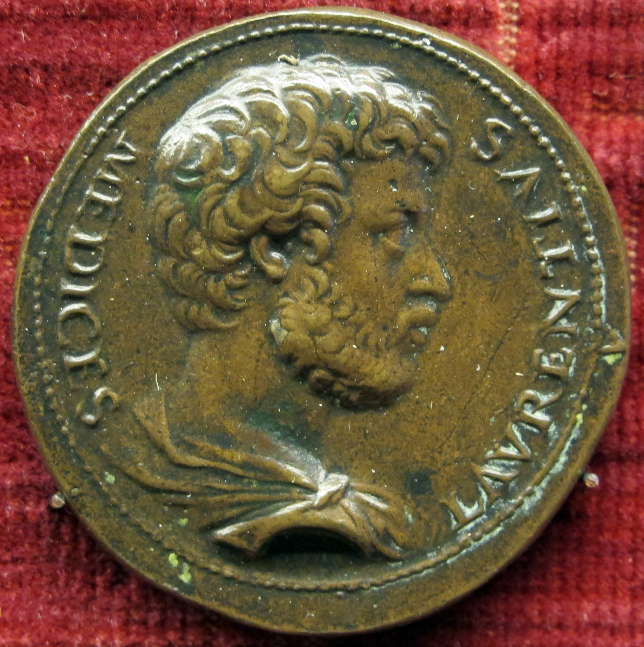 Medaglia di Lorenzino de' Medici (1514-1548)